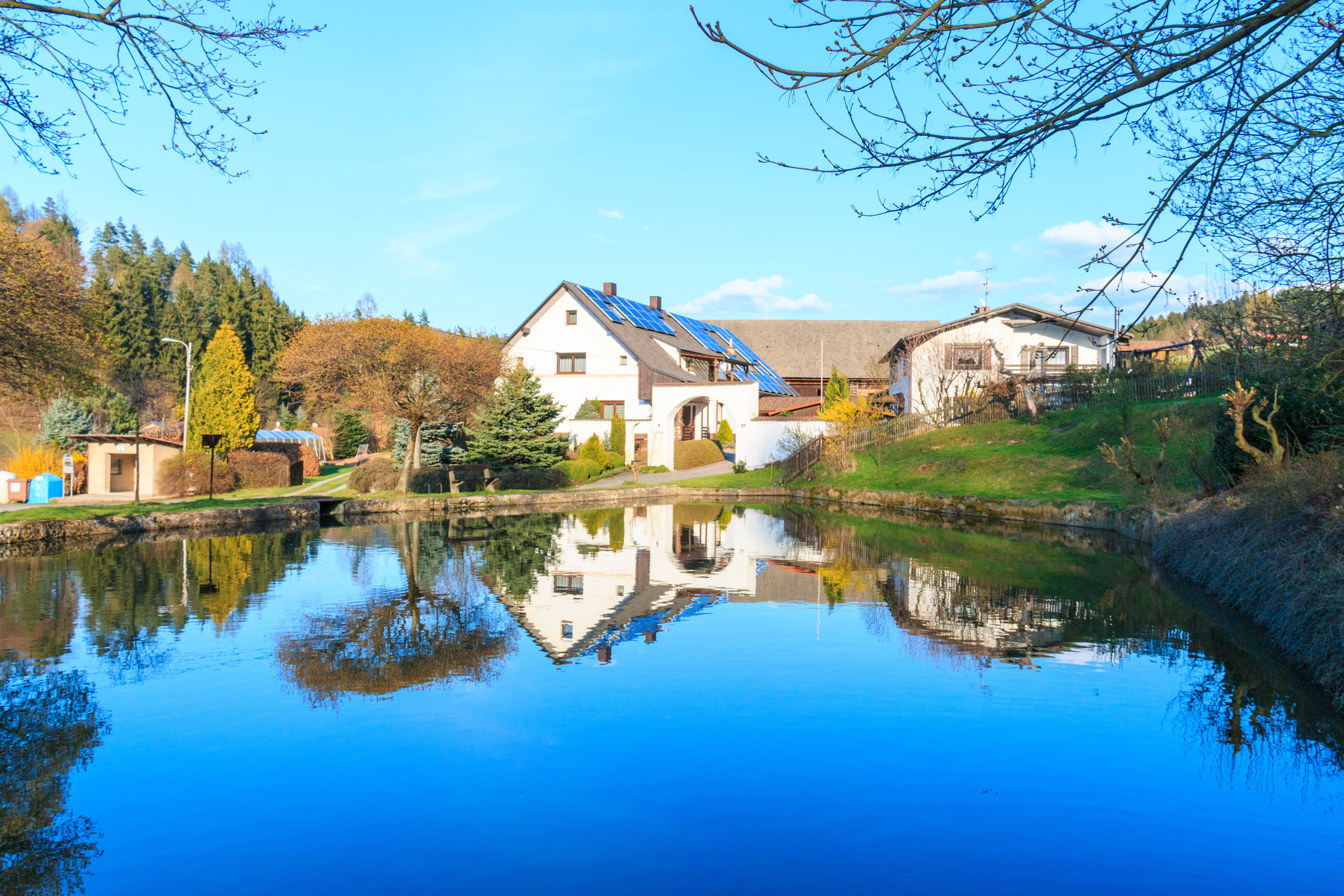 Bražec návesní rybník